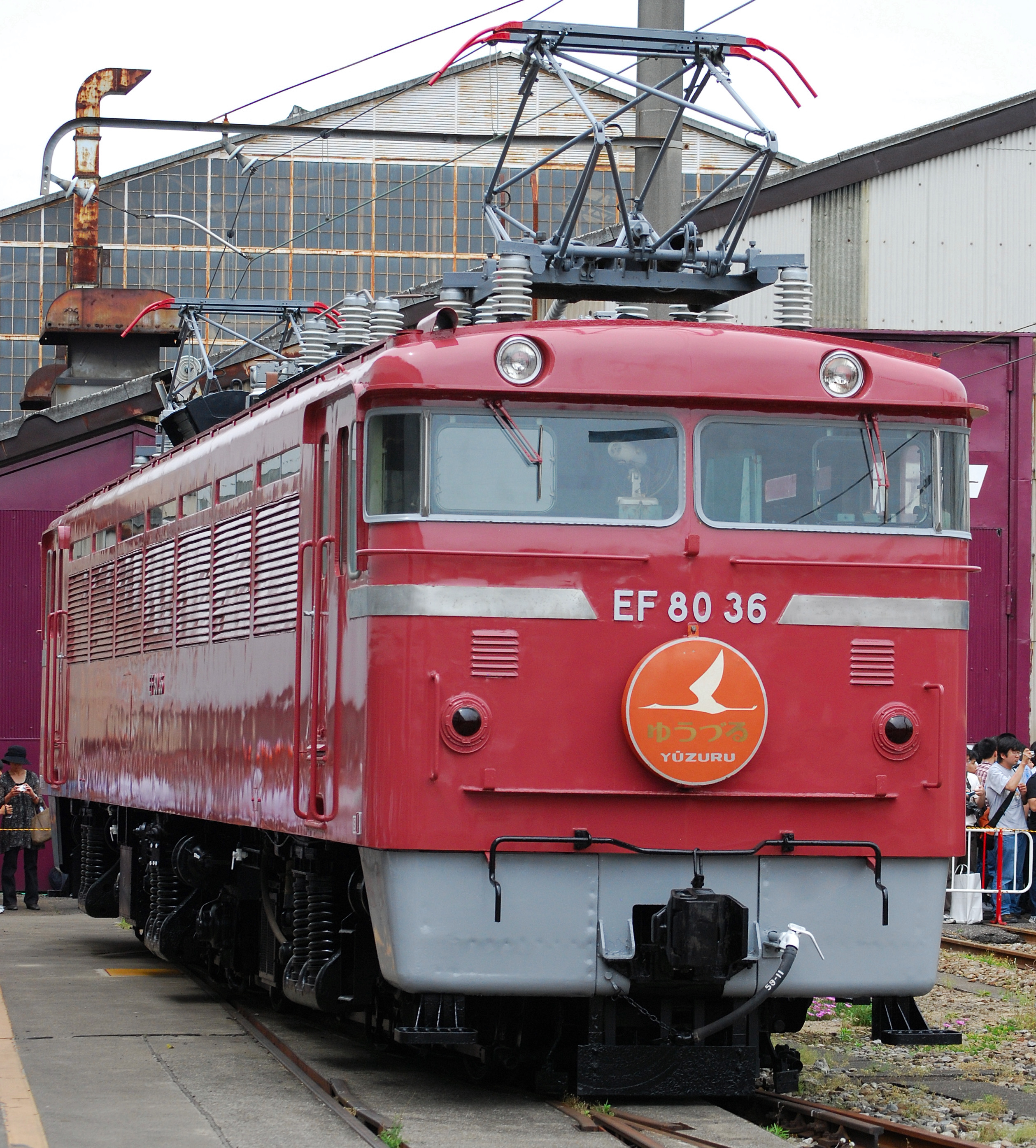 大宮総合車両センターでのEF80 36(JRおおみや鉄道ふれあいフェアでの工場開放にて撮影）